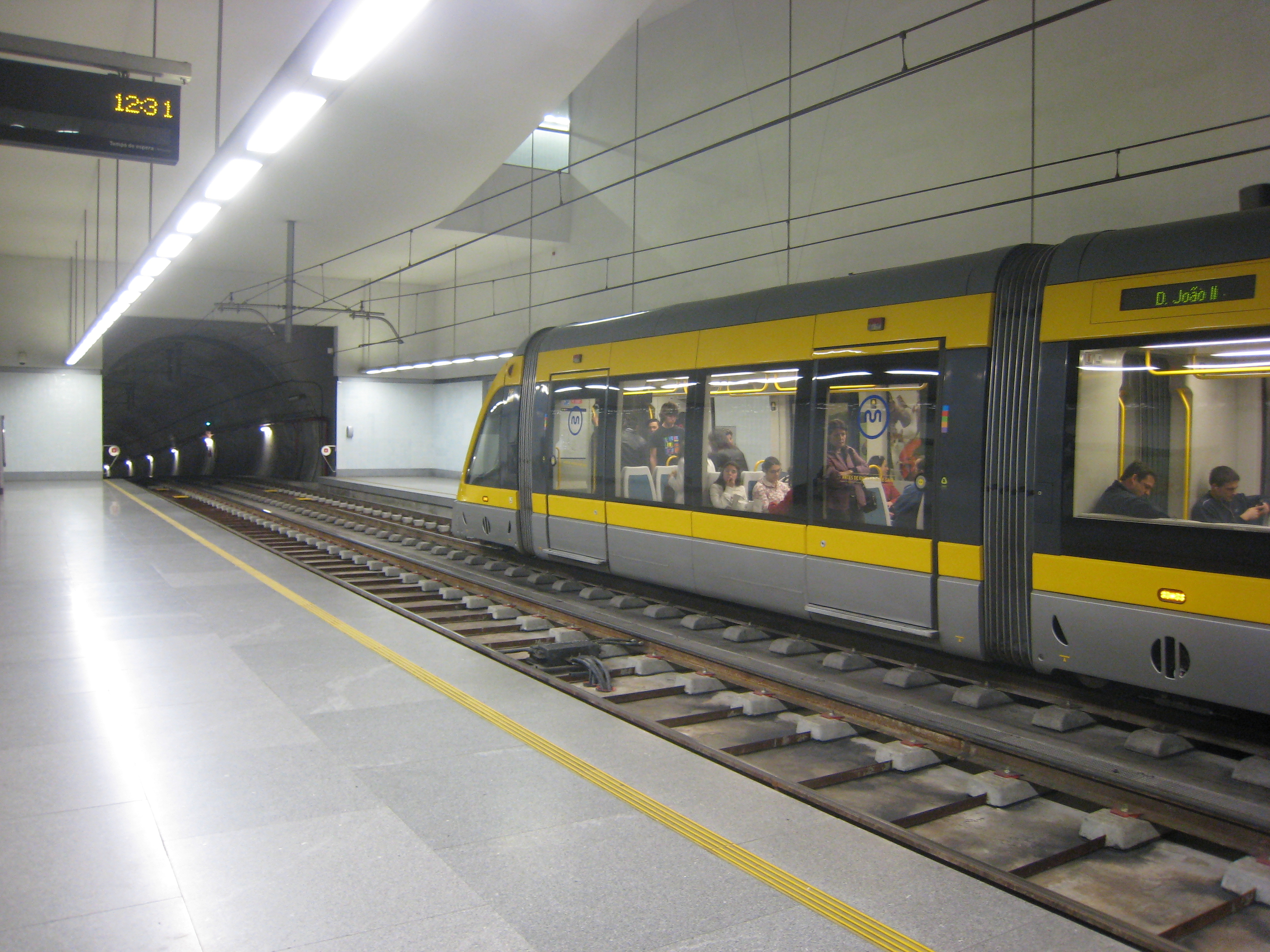 Estação dos Alidados do Metro do Porto, Porto, Portugal.